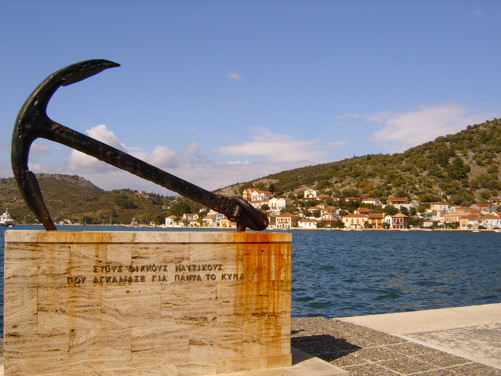 Le village de Vathi sur l'île d'Ithaque